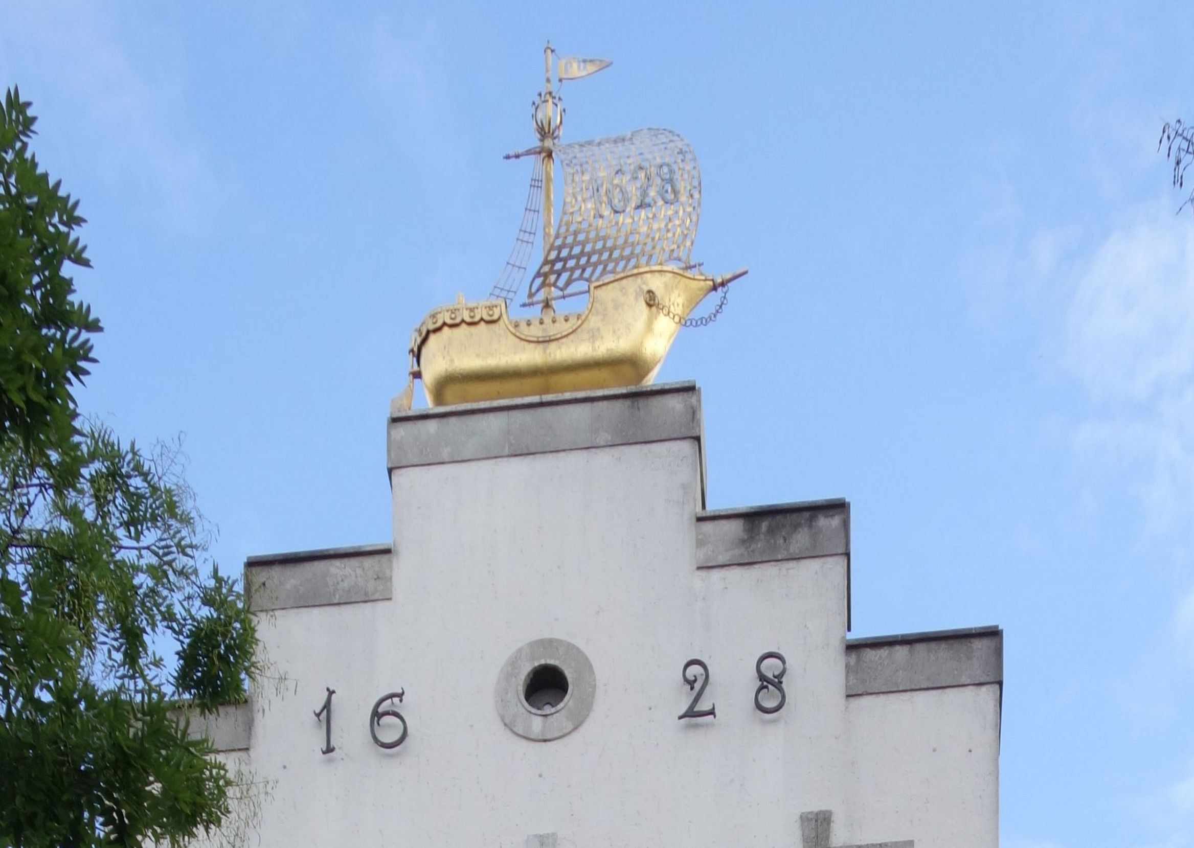 Düsseldorf, Hafenstraße, Gaststätte Zum Schiffchen, September 2015.